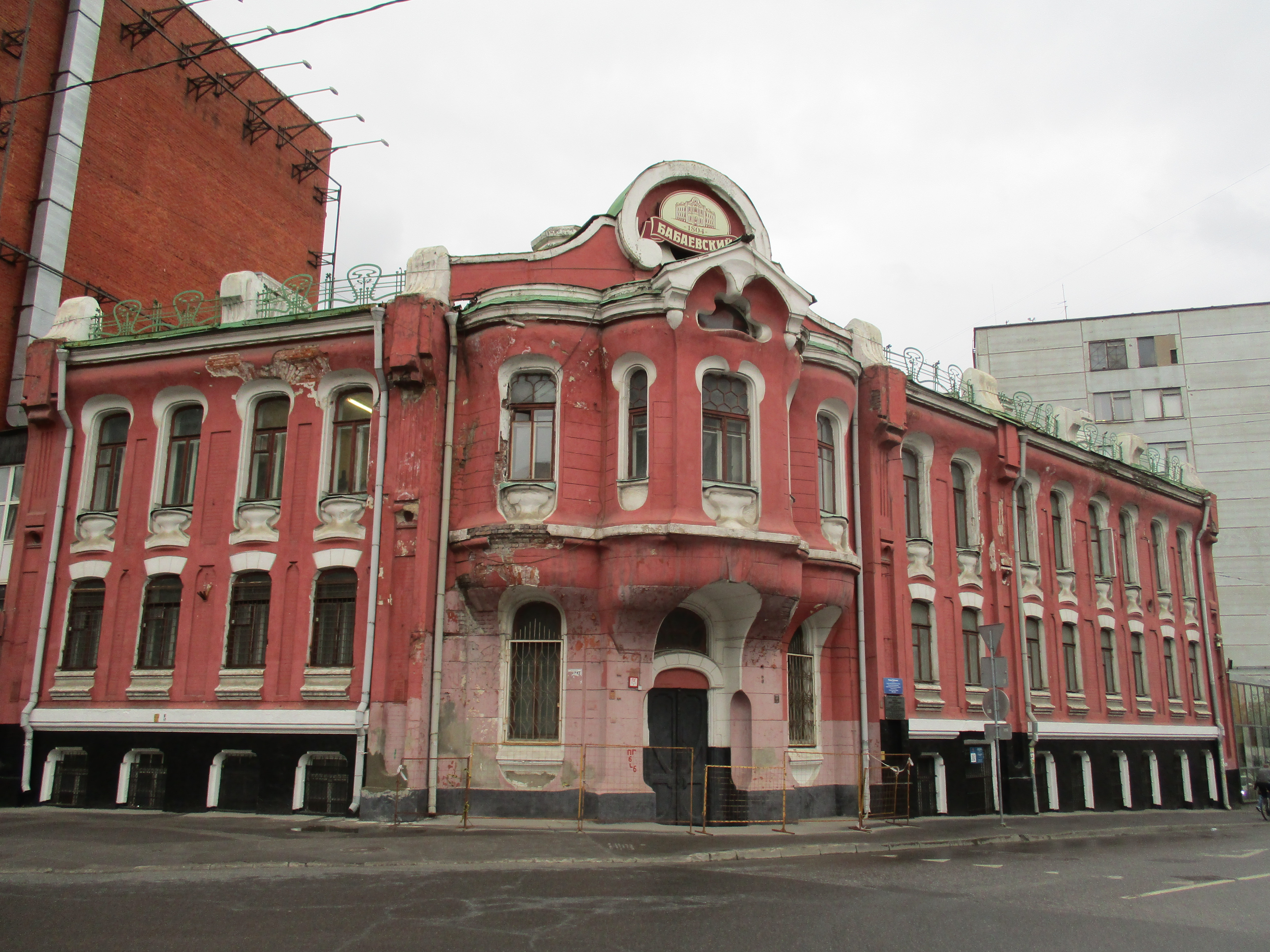 Жилой дом Абрикосовых с административными помещениями Товарищества А.И.Абрикосова Сыновей (с 1922 г. - кондитерская фабрика им. П.А.Бабаева): Красносельская М. ул., дом 7, строение 31, Красносельский, Центральный округ, Москва